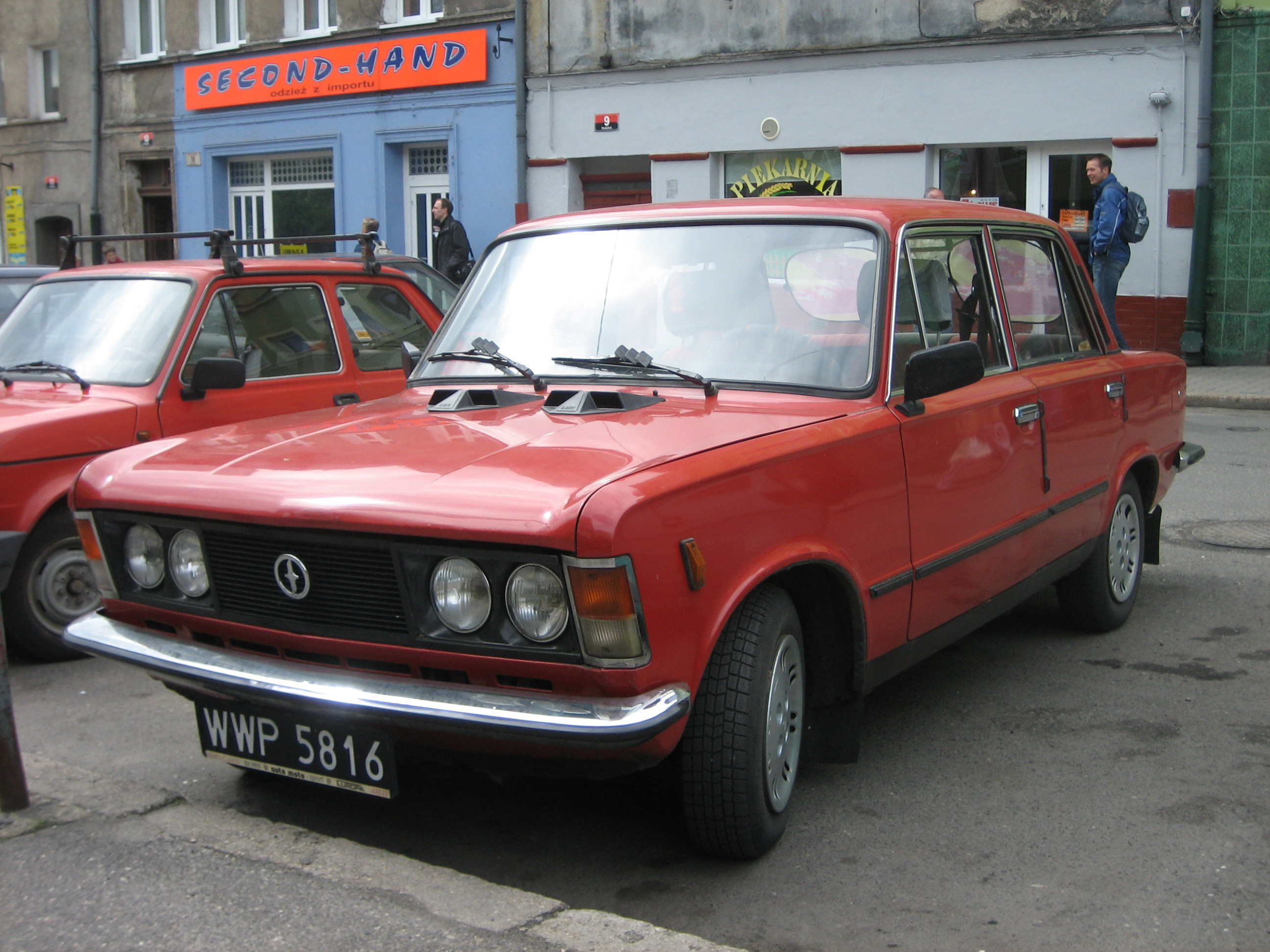 FSO 125p